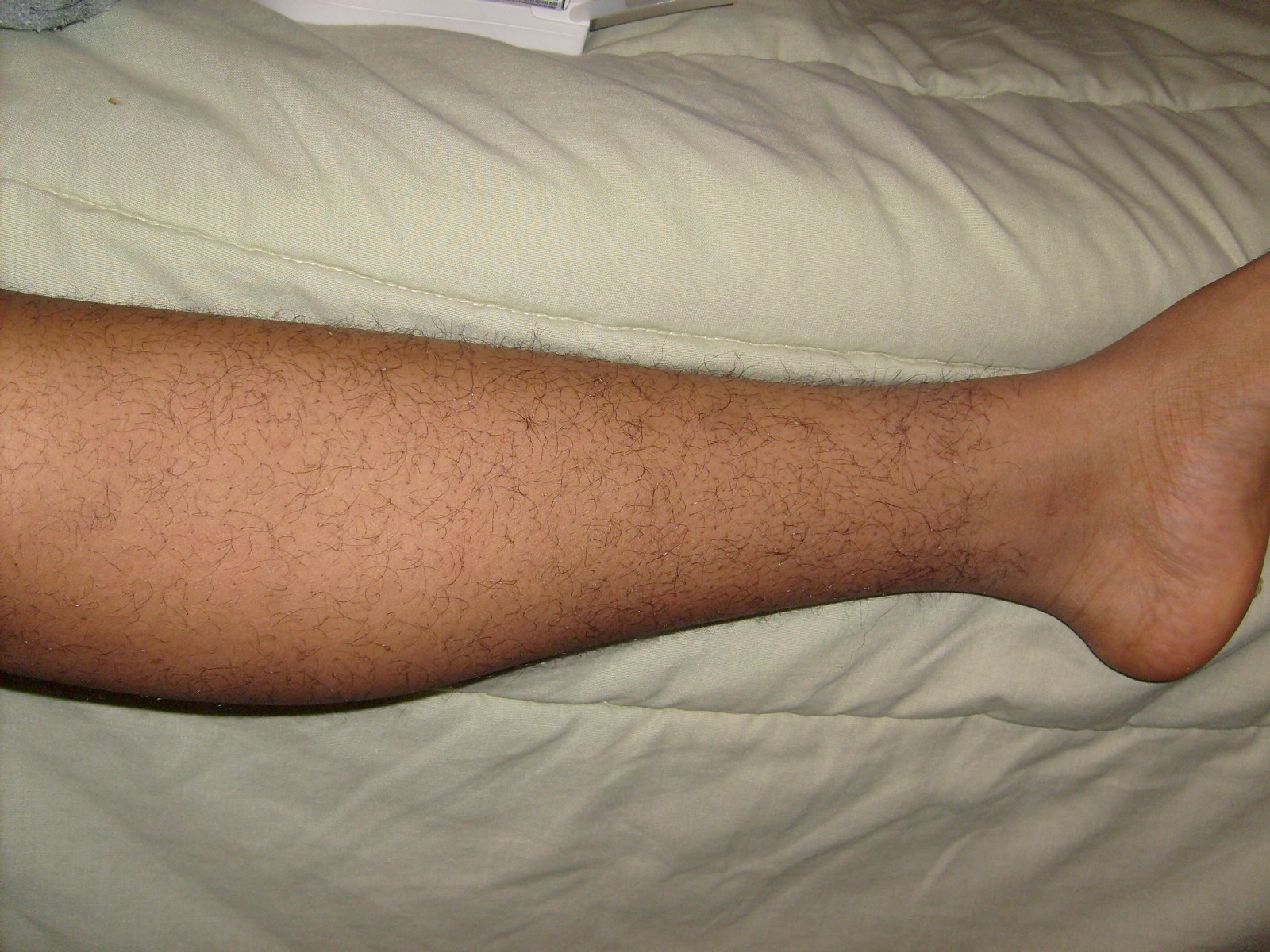 My Leg